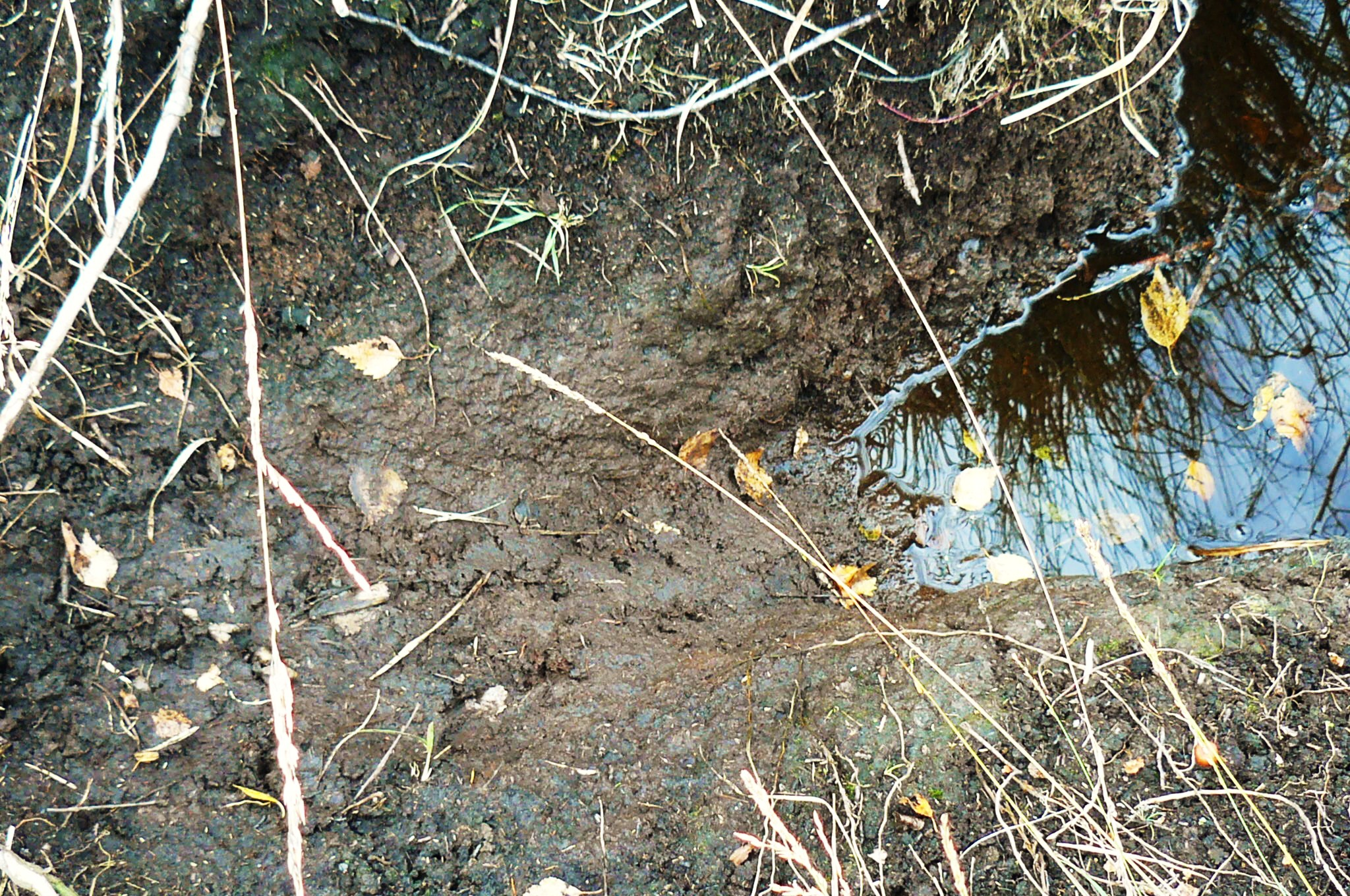 Torf na terenie Bagna Chlebowo.